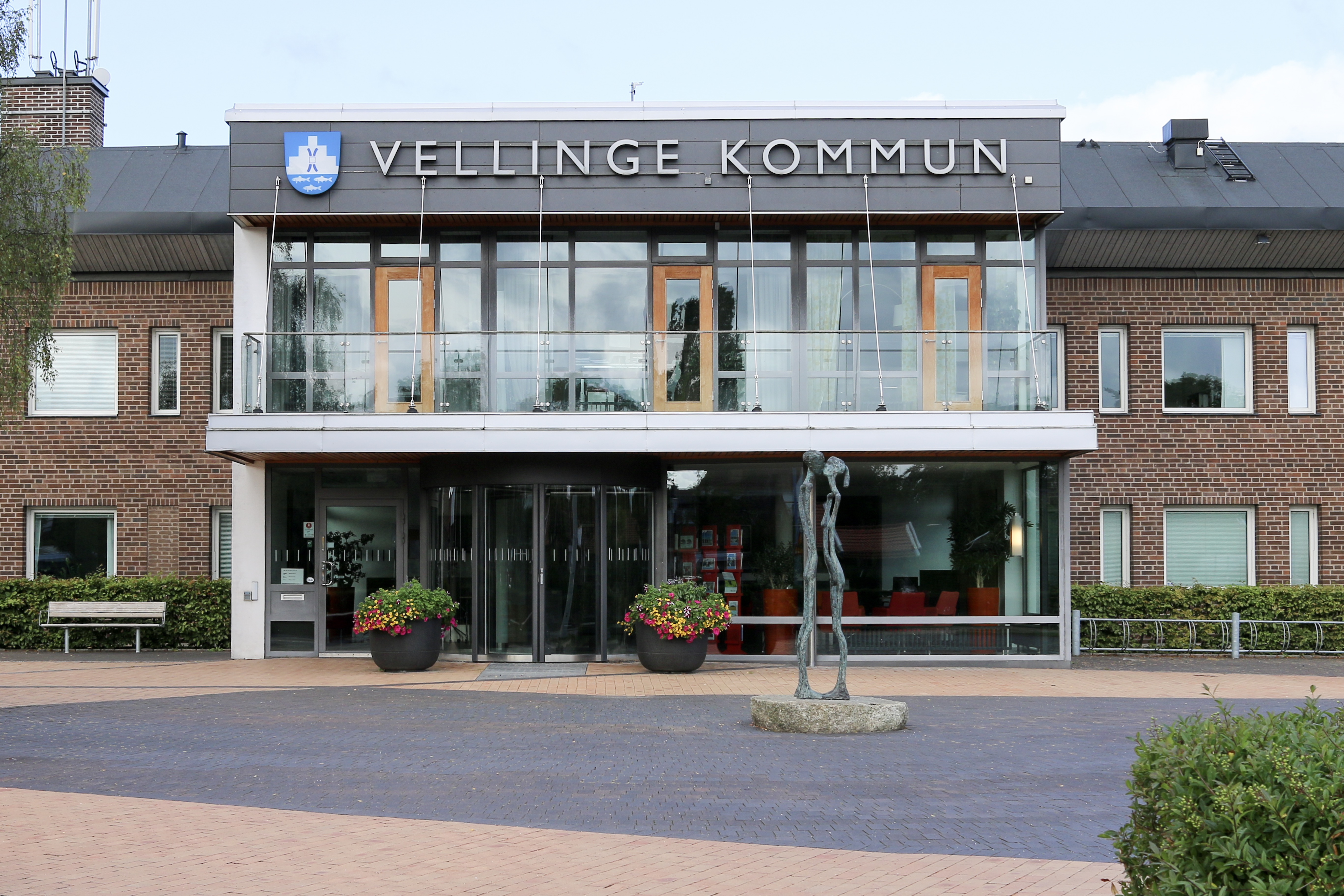 Vellinge kommunhus